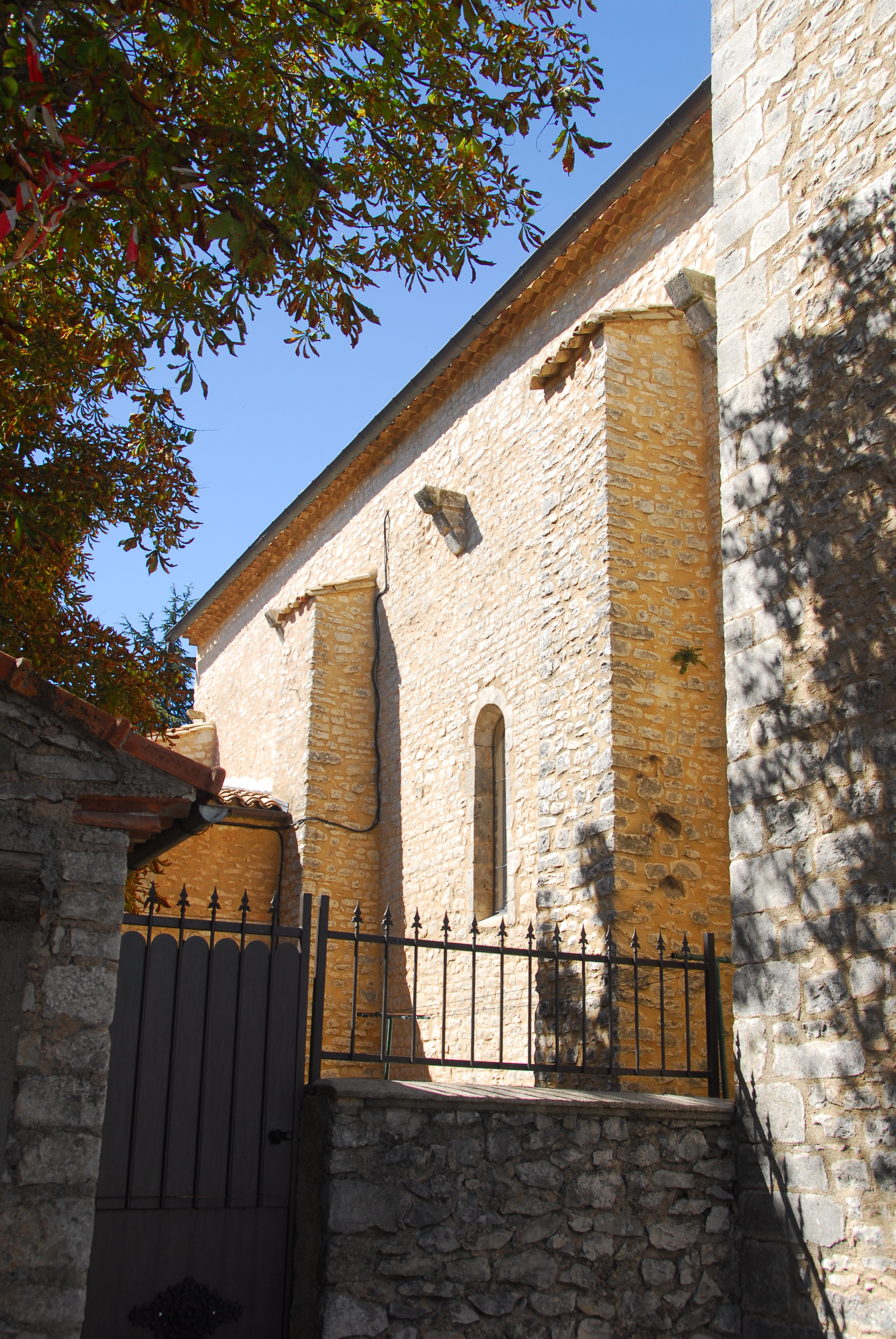 N-D et St-Christophe de St-Christol, Hauptschiff, Südwand